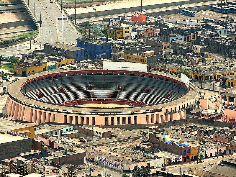 La Plaza de Acho - Perú